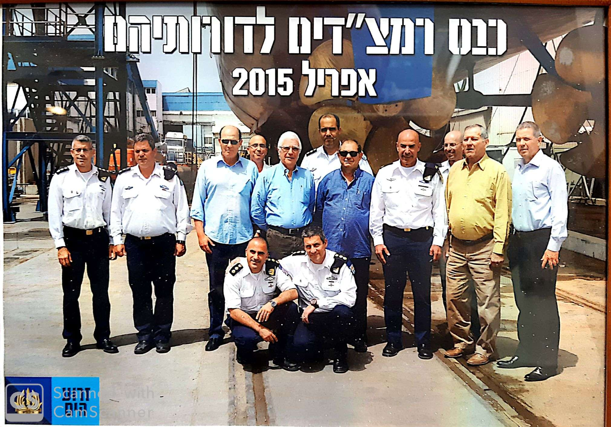 כנס מפקדי מספן הציוד אפריל 2015